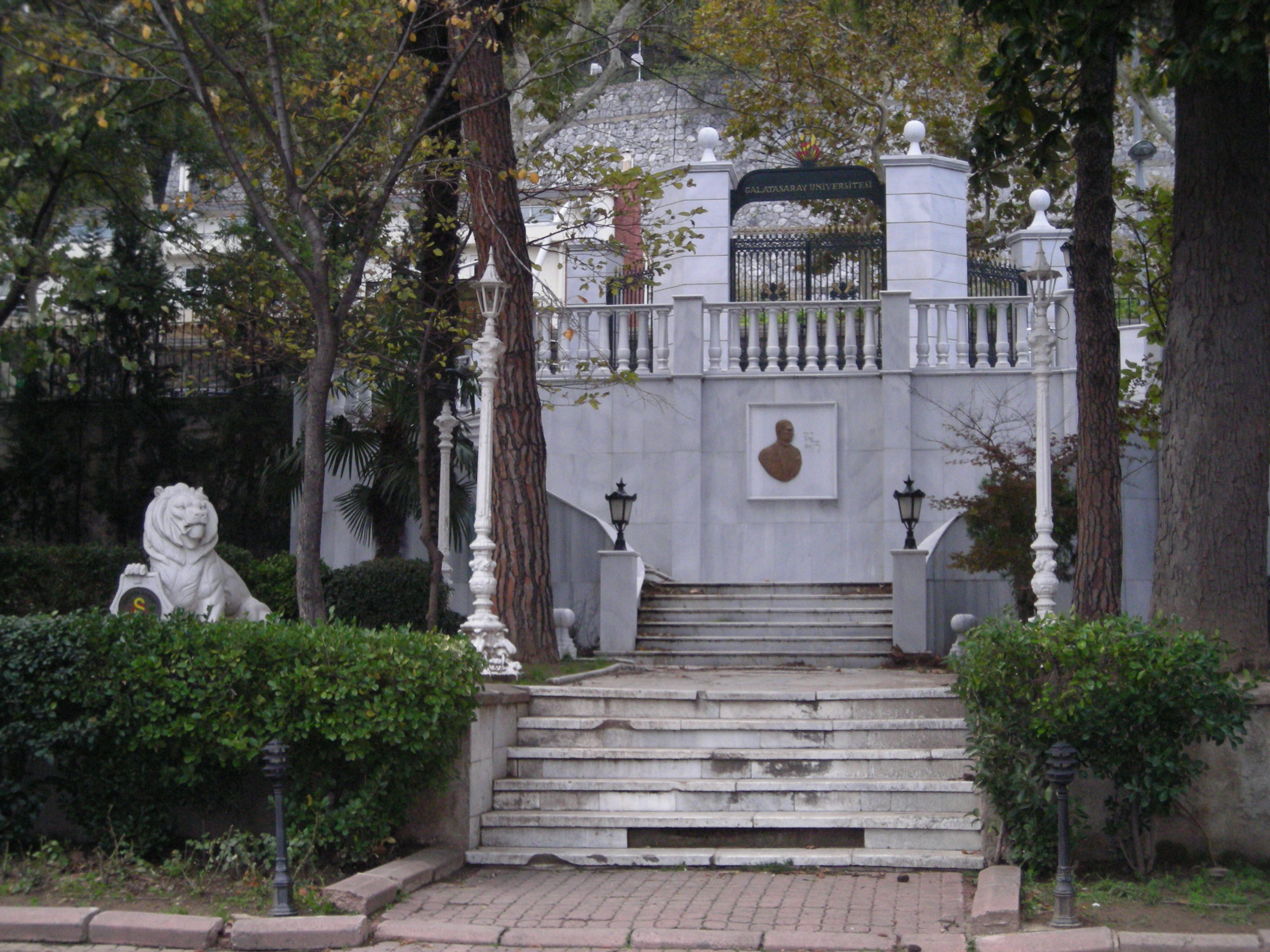 L'entrée